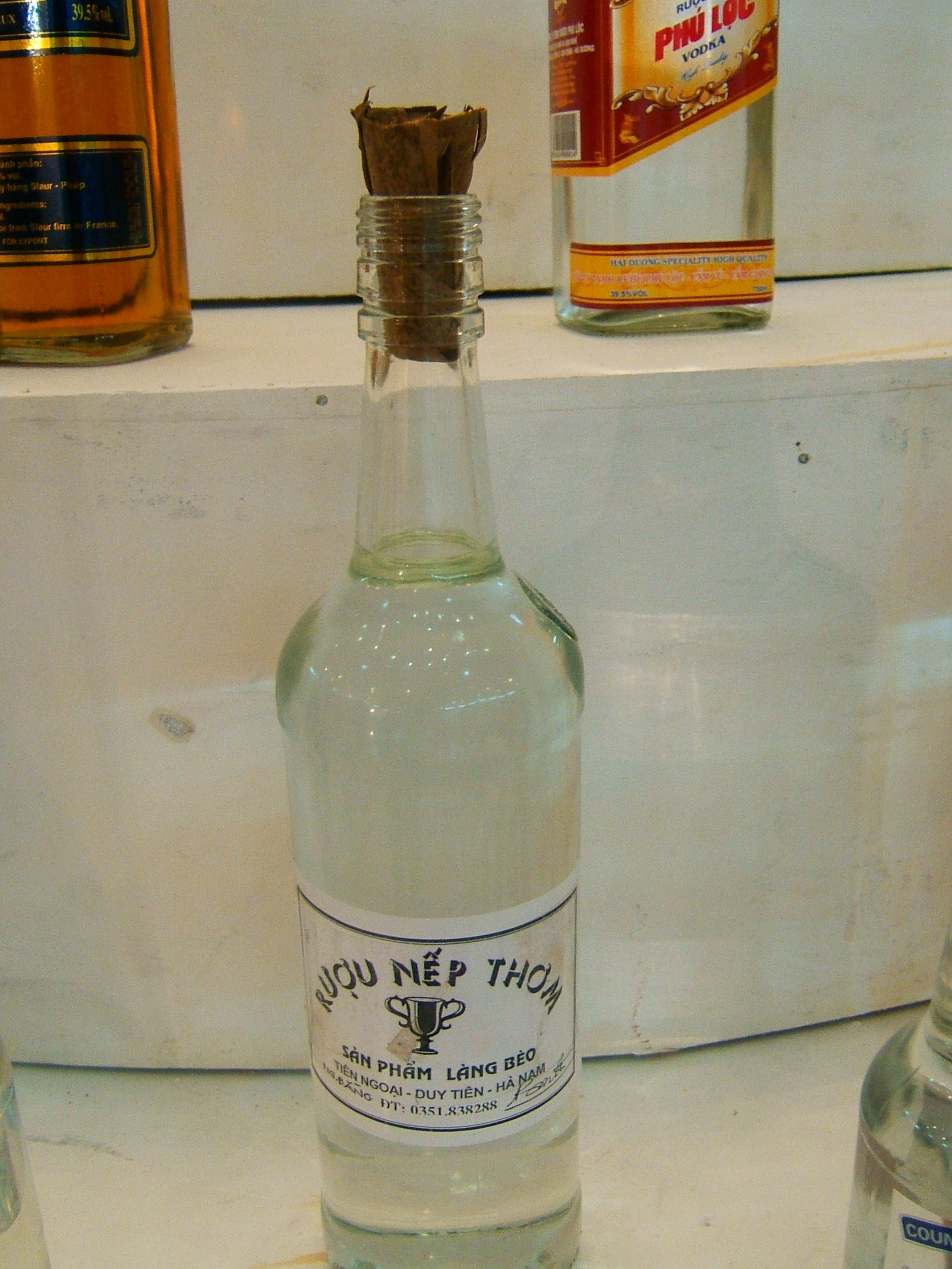 Rượu nếp quýt ĐạTẻh